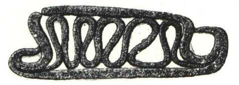 Eldstål från vikingatiden, funnet i Småland